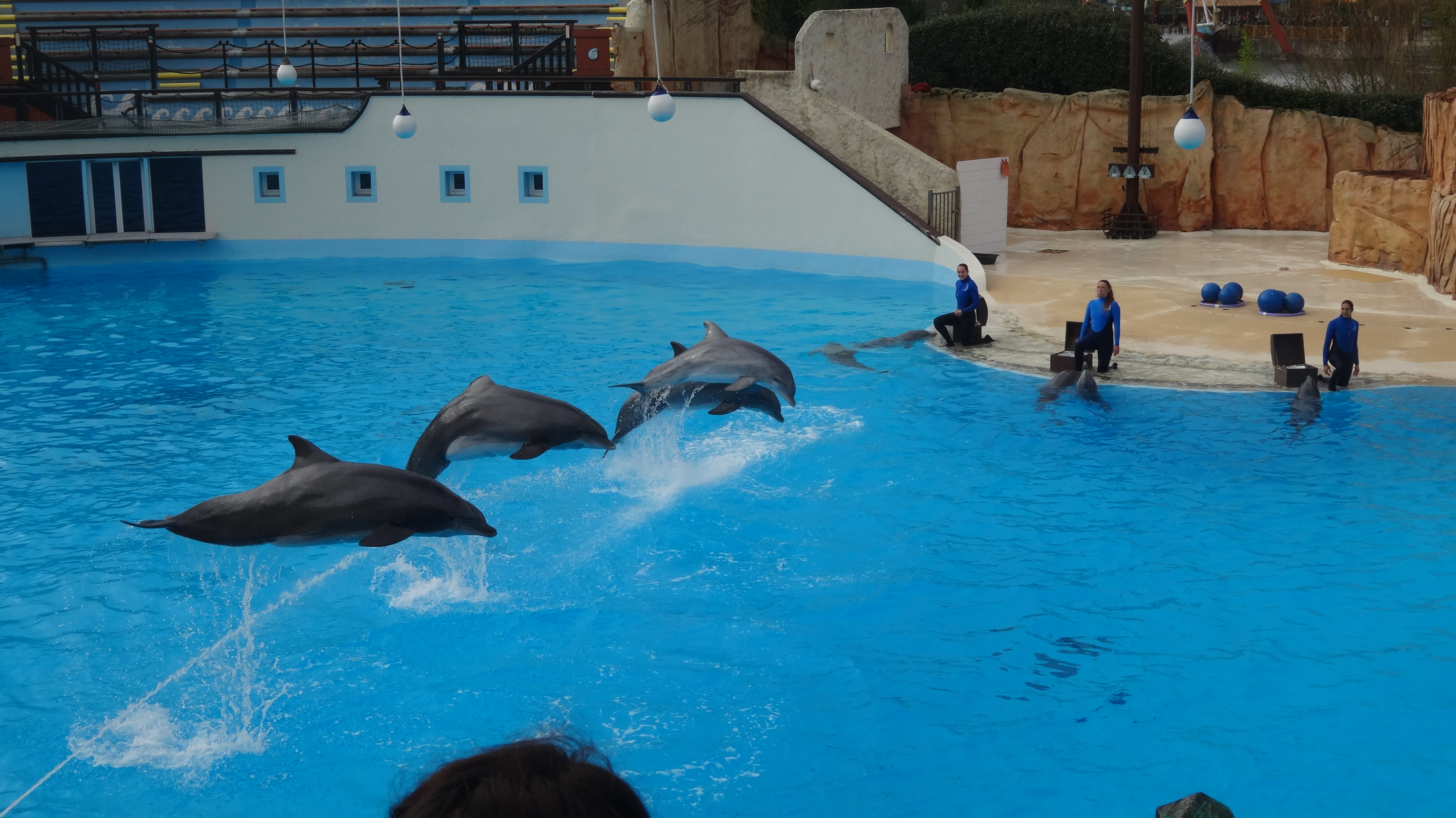 Spectacle avec dauphins au Parc Astérix